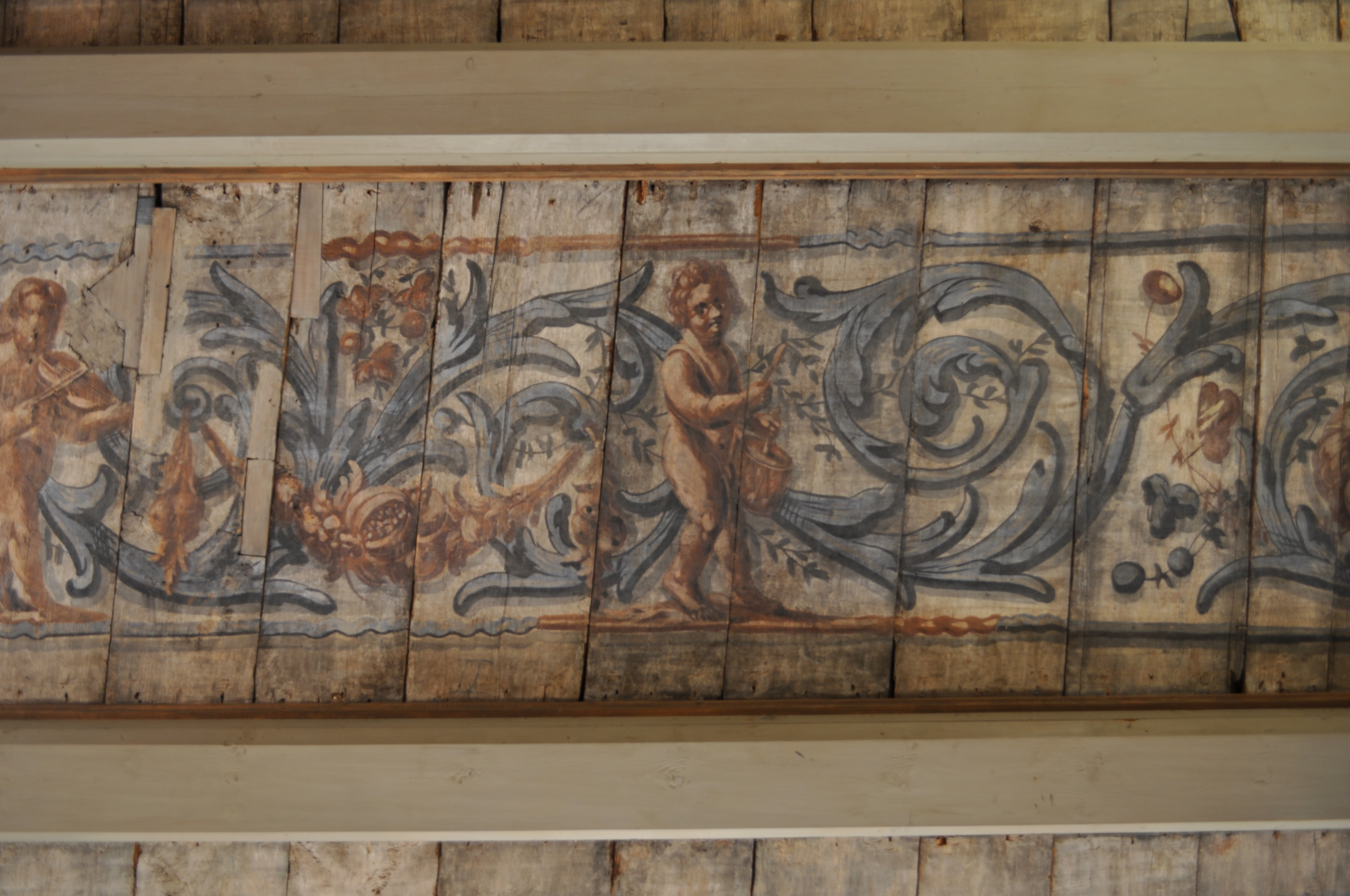 Detail der im Museum für Hamburgische Geschichte eingebauten Decke aus dem Haus Grimm 31. Die Bemalung stammt aus der 2. Hälfte des 17. Jahrhunderts